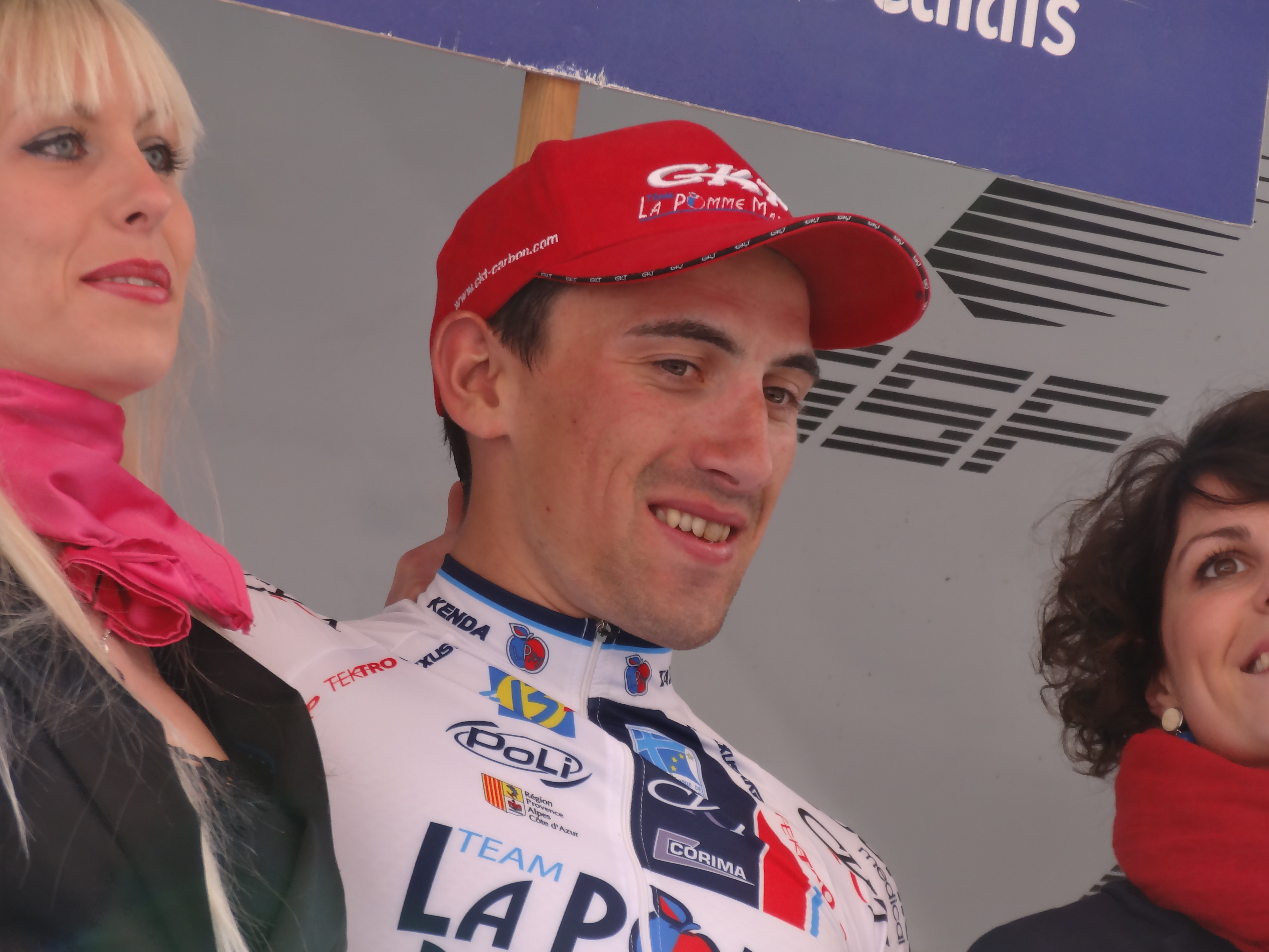 Reportage photographique réalisé le dimanche 5 mai 2013 à l'arrivée de la cinquième et dernière étape de l'édition 2013 des Quatre jours de Dunkerque à Dunkerque, Nord, Nord-Pas-de-Calais, France. Depicted person: Yannick Martinez